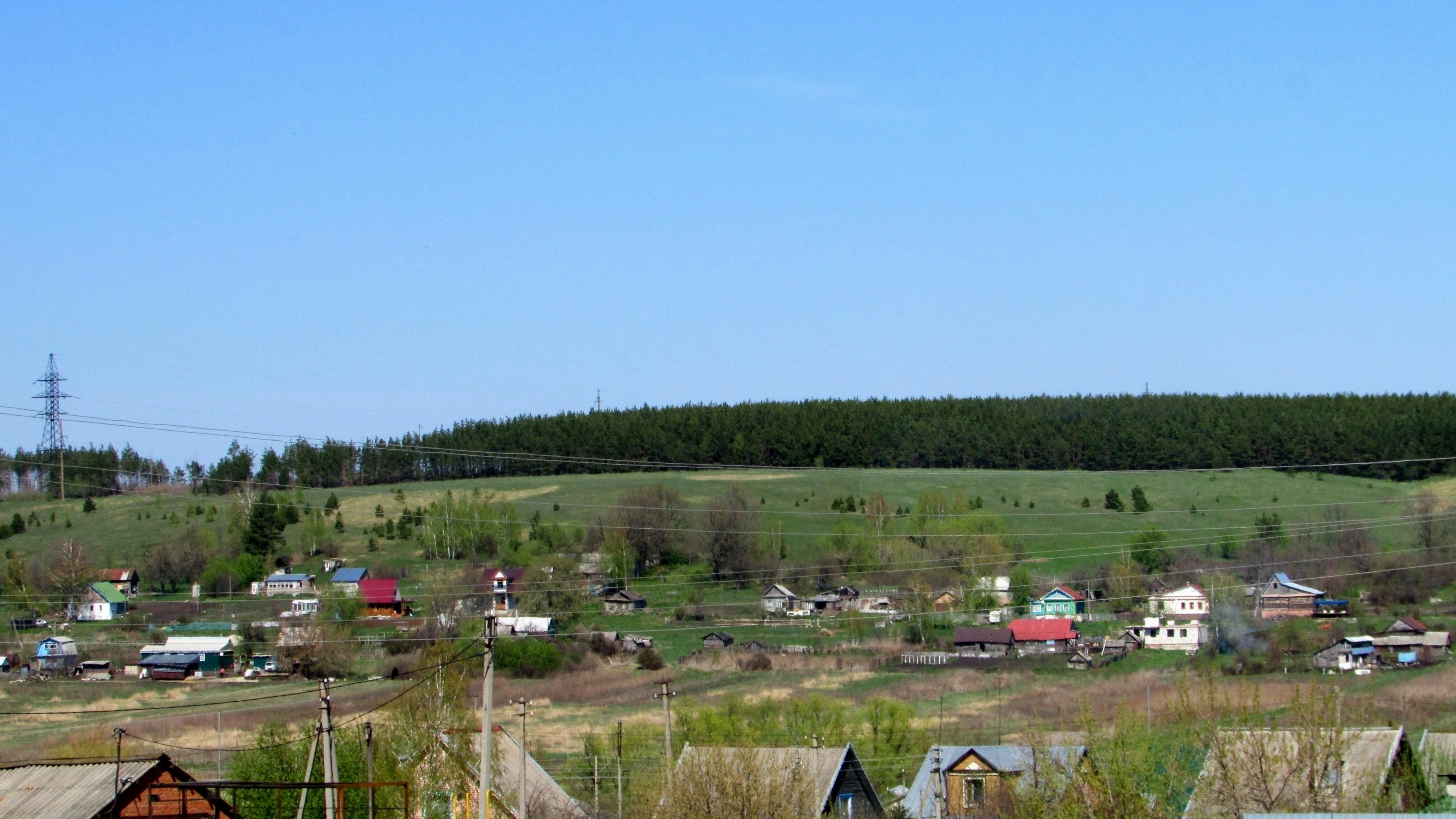 Вид на села